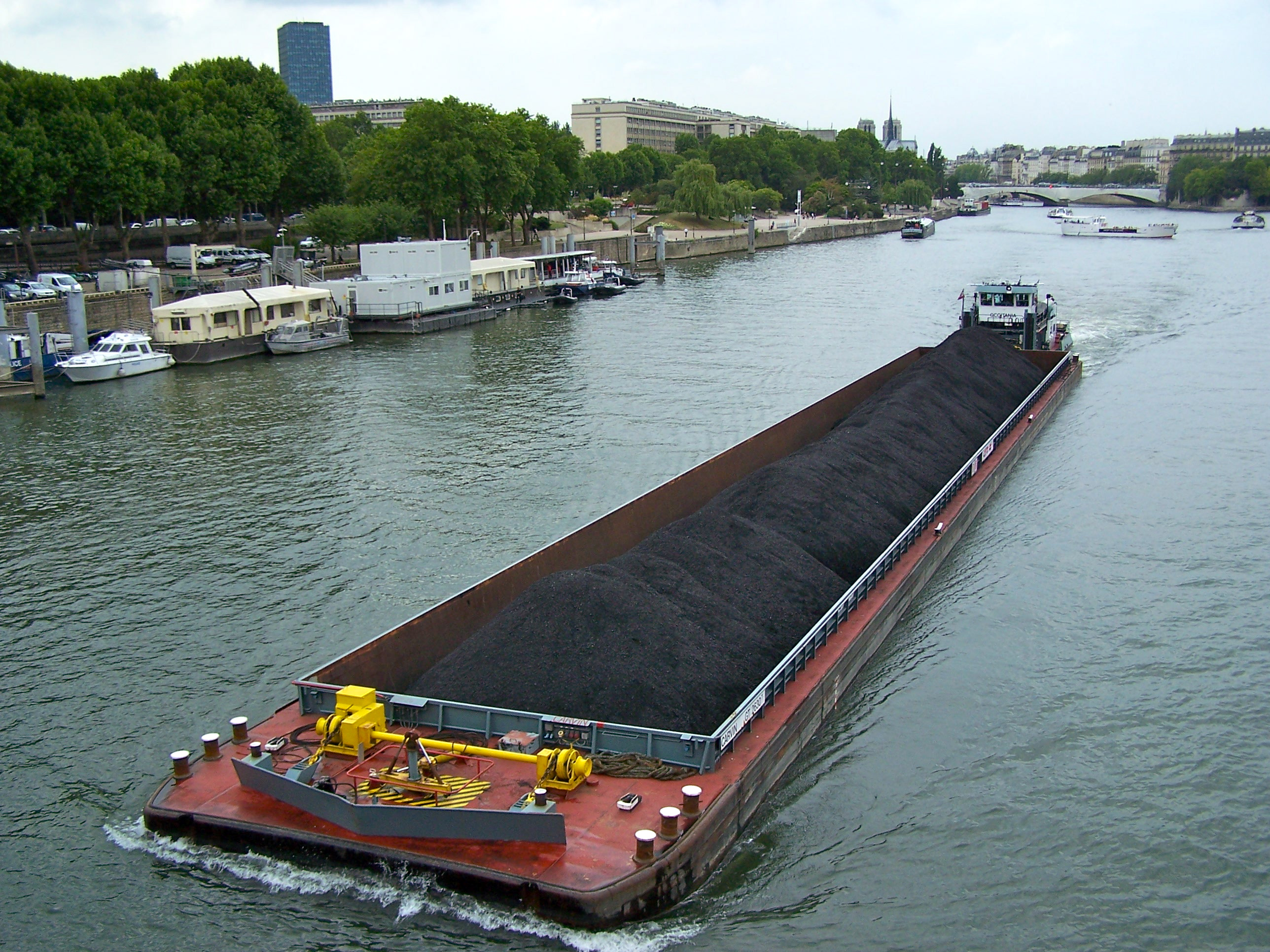 Le pousseur Occitania et une barge de 2500 tonnes portant un chargement de charbon à destination d'une centrale thermique, Paris France